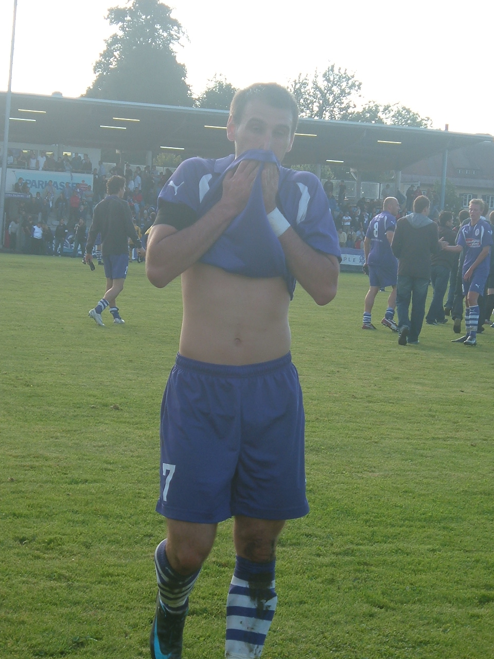 Mersudin Jukic beim Spiel SV Austria Salzburg gegen SC Golling